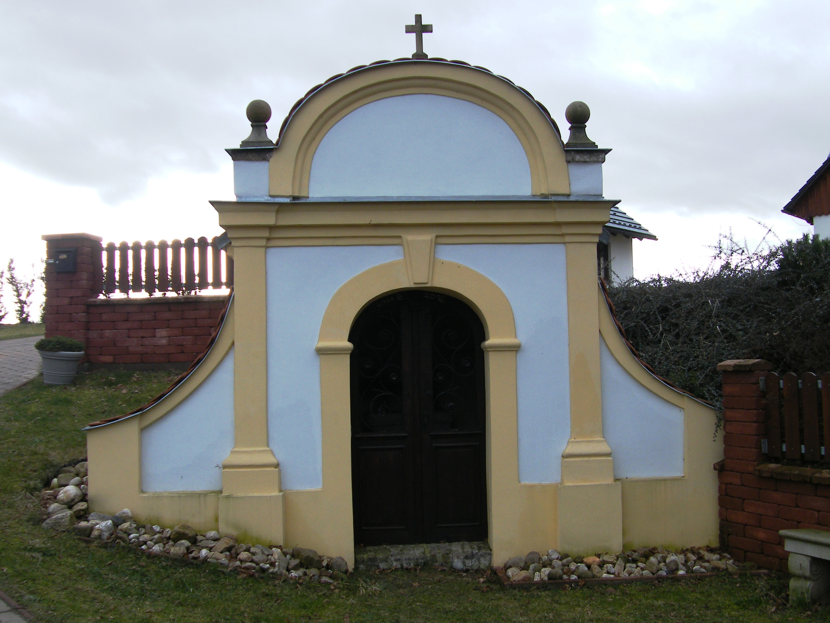 Kaple Panny Marie (Jaroměř-Na Žižkově)